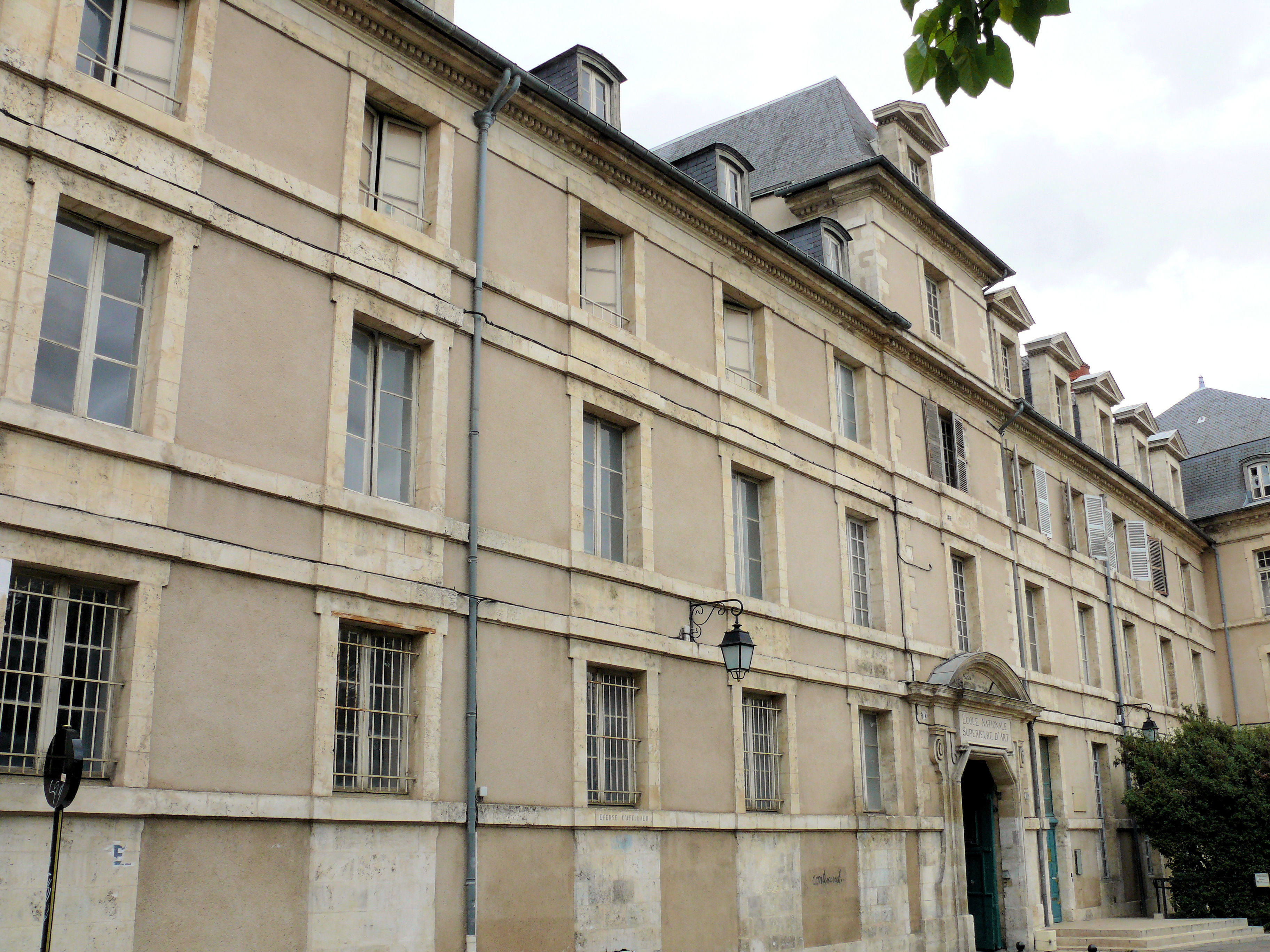 Bourges - Collège des Jésuites - Façades sur rue